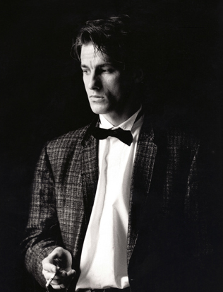 портрет Вячеслава Репина, Париж, 1987 г.